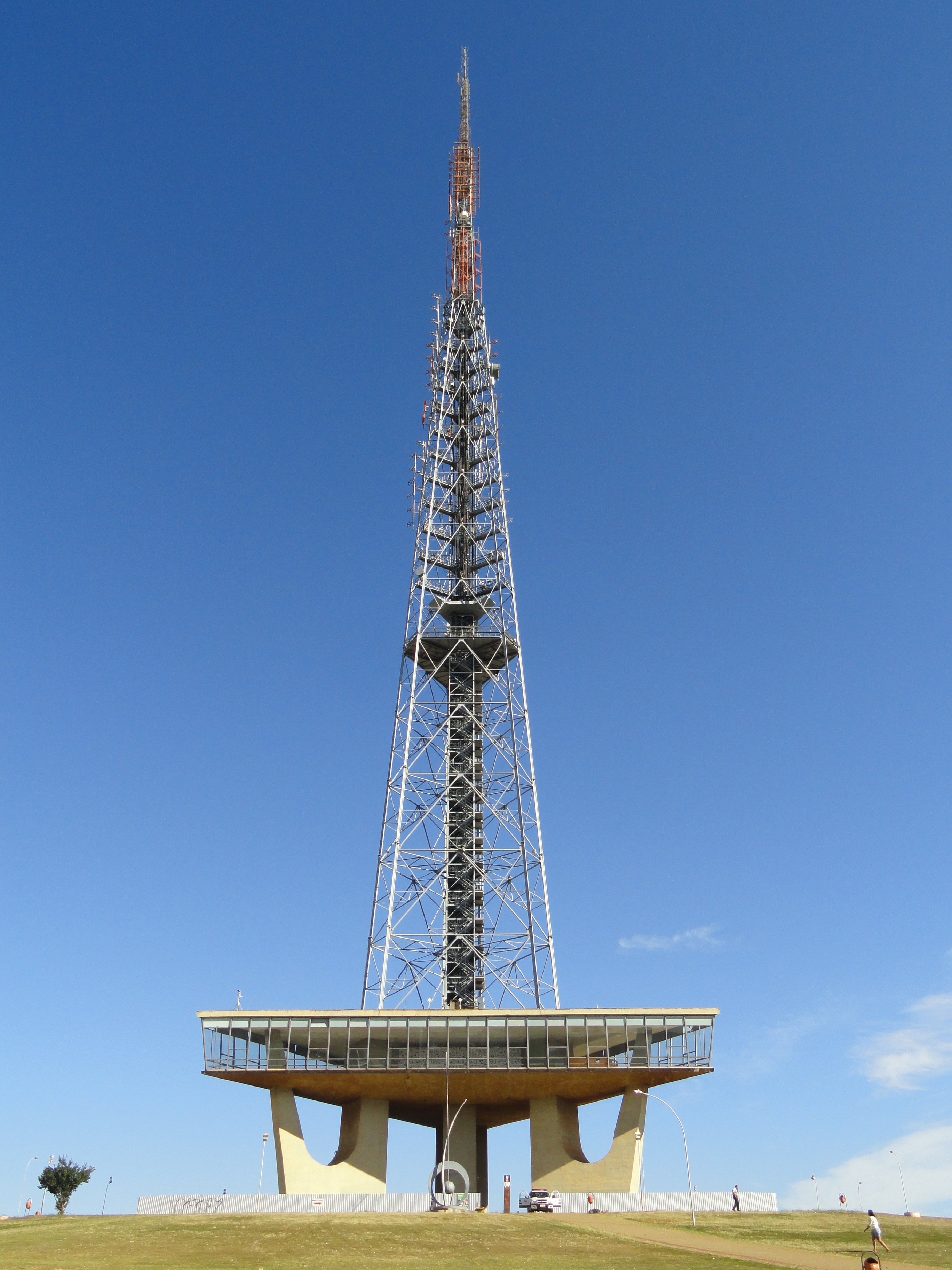 Torre de TV de Brasília, Brasília, Brazil.